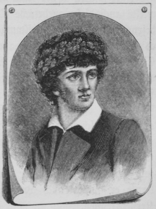 Stich nach einem Foto von Karl Friedrich Wagners (1789-1875) Miniaturgemälde von Karl Gangloff, 1813.